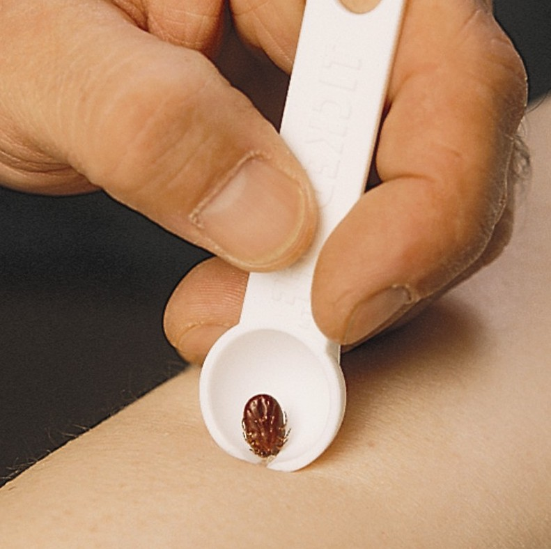 Een tekenlepel om teken te verwijderen.